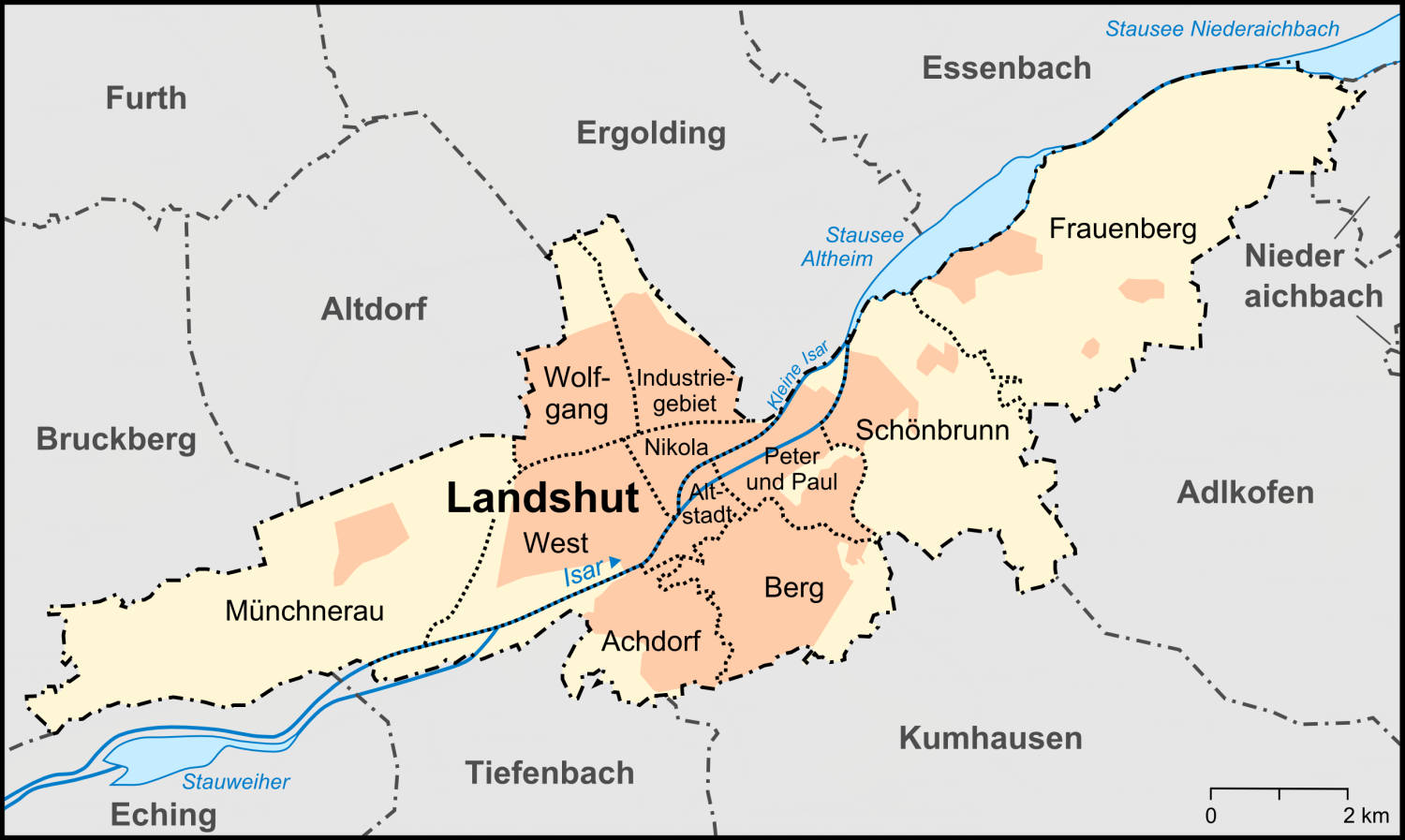 Karte der Stadtteile und der Umlandgemeinden von Landshut